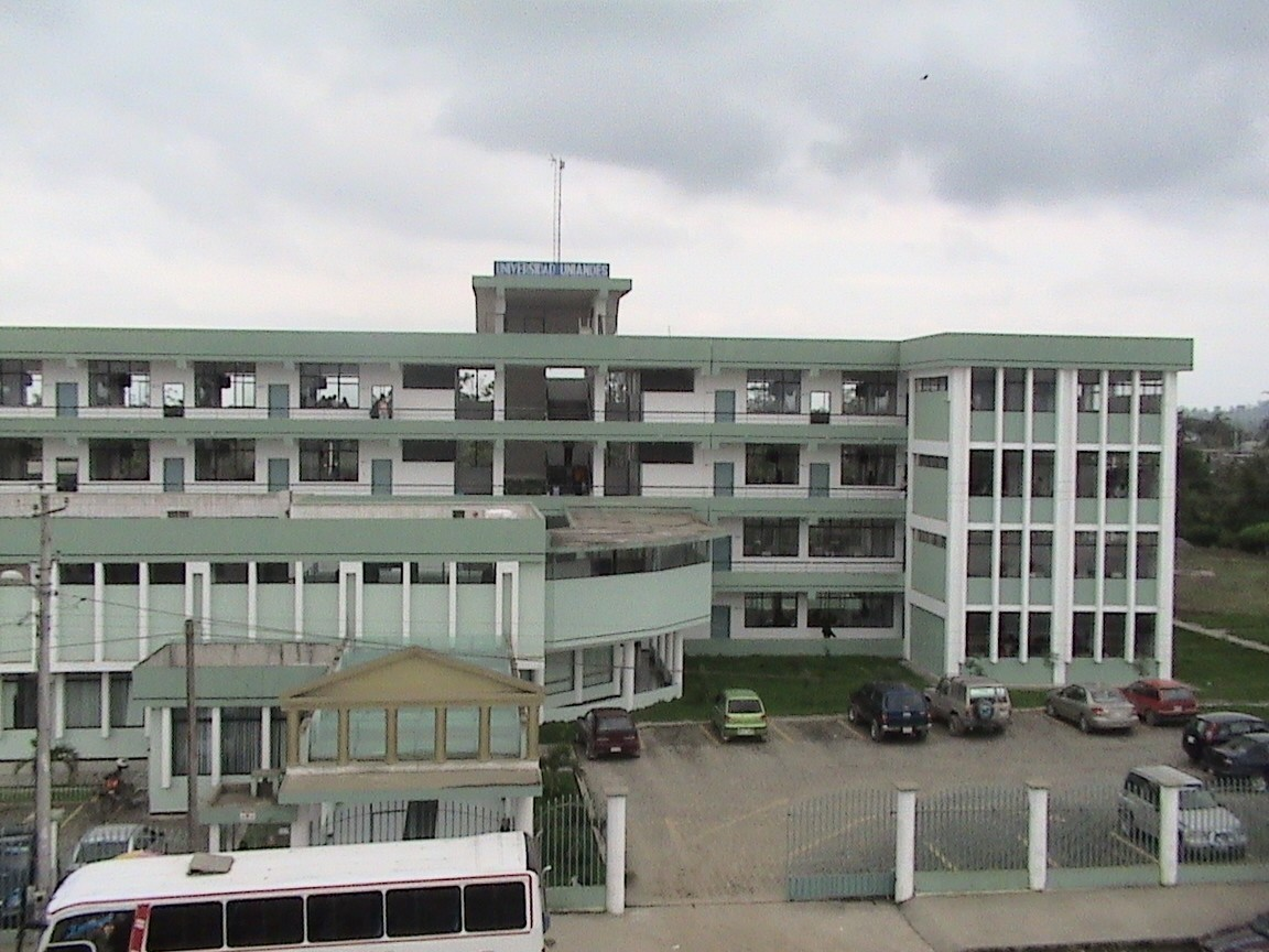 Uniandes Santo Domingo